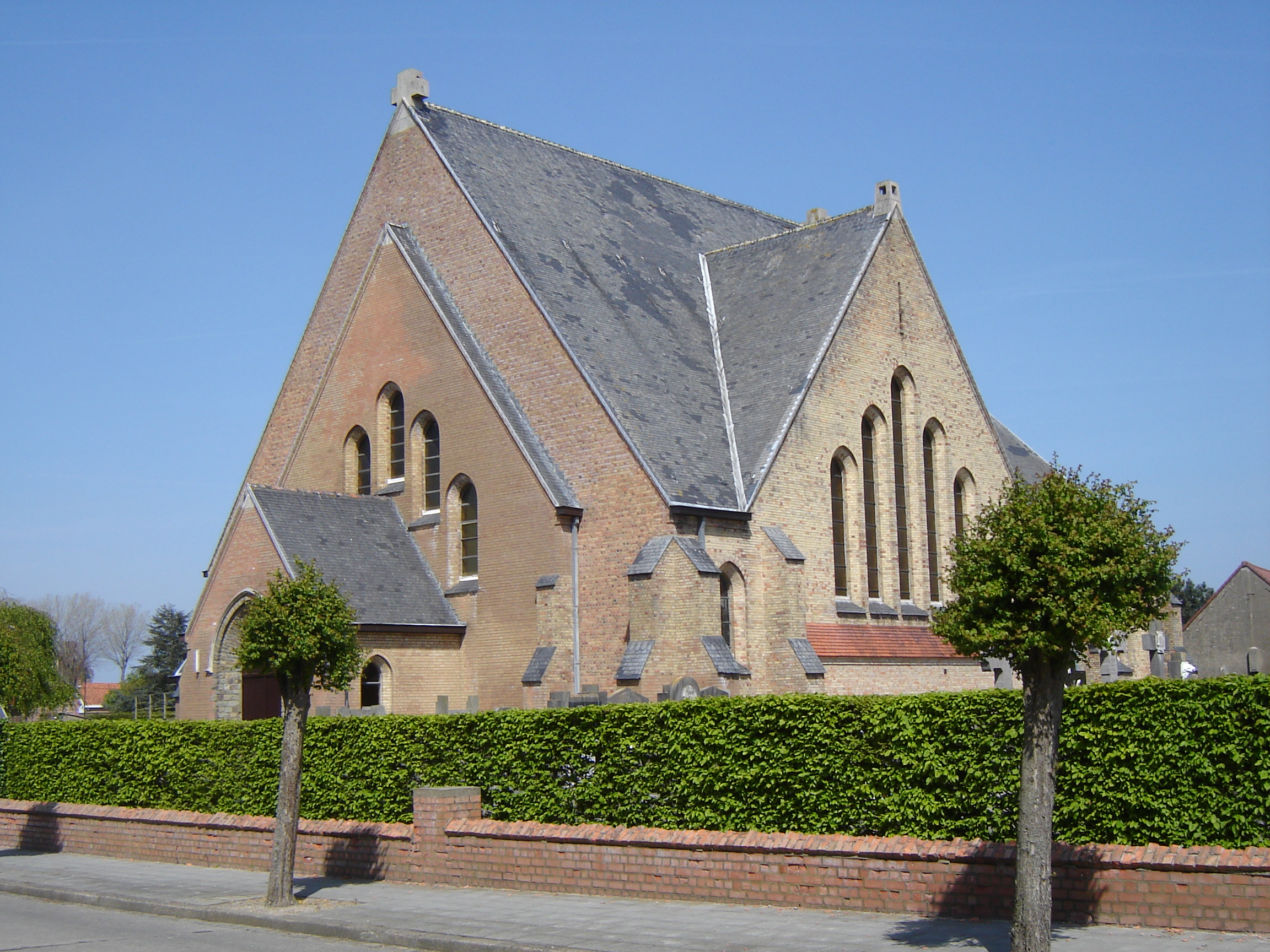 Kerk van de Heilige Pastoor van Ars, De Mokker, KoekelareChurch of the Saint Curé d'Ars, De Mokker, Koekelare West Flanders, Belgium